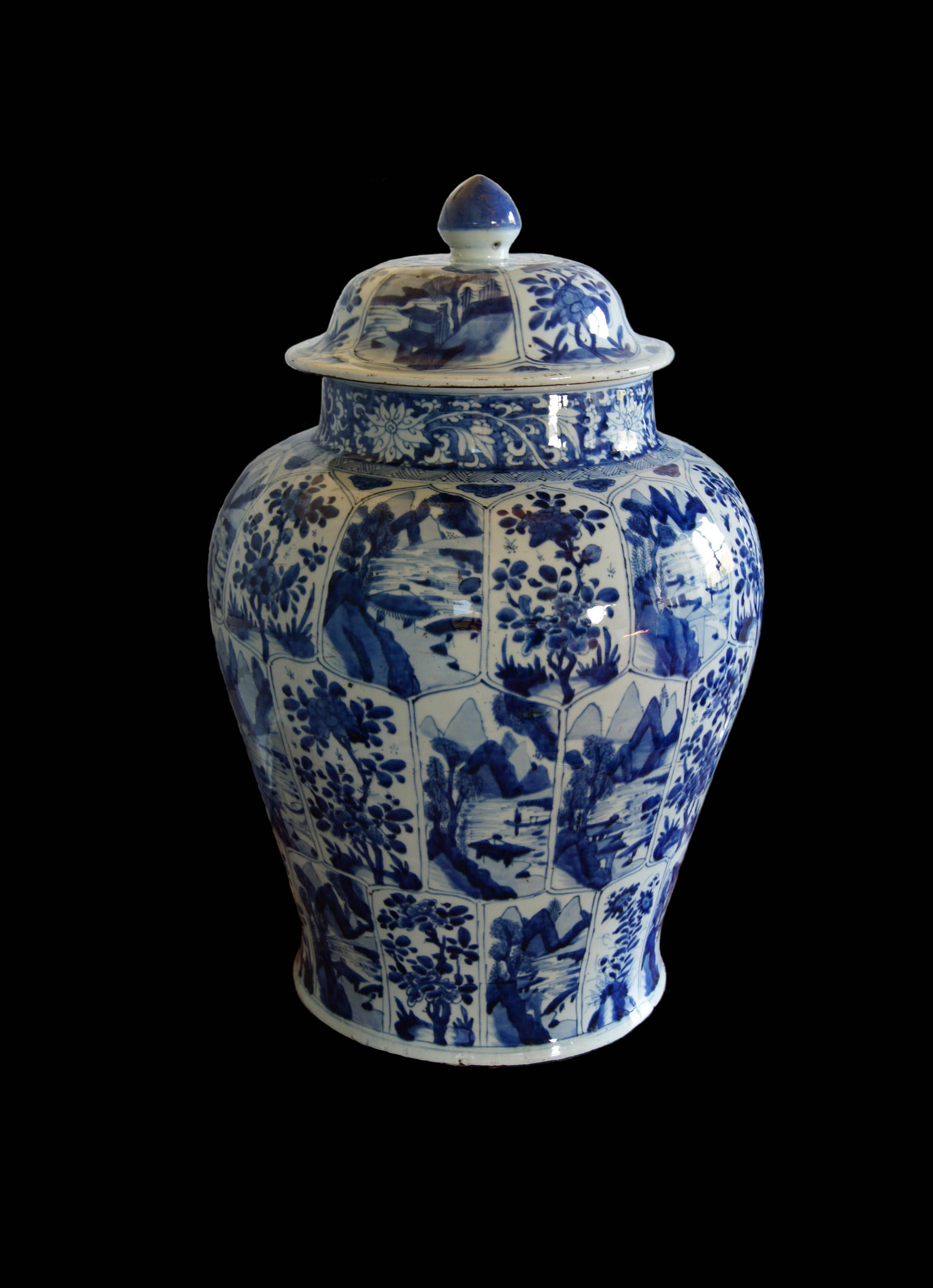 Delftware, XVIIth century, Château de Vaux-le-Vicomte, France